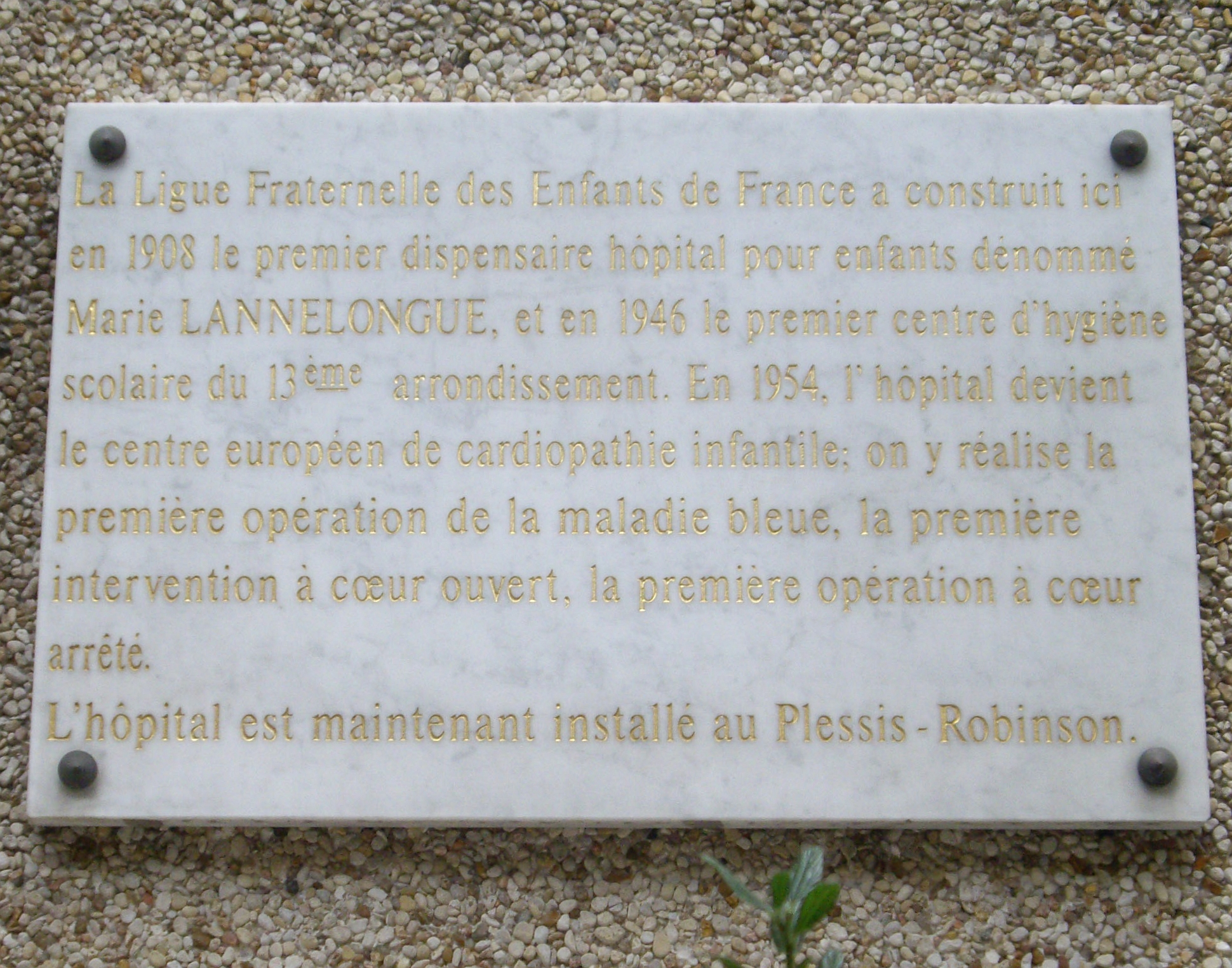 Plaque commémorative, 127 rue de Tolbiac, Paris 13e.« La Ligue fraternelle des enfants de France a construit ici en 1908 le premier dispensaire hôpital pour enfants dénommé Marie Lannelongue, et en 1946 le premier centre d'hygiène scolaire du 13e arrondissement. En 1954, l'hôpital devient le Centre européen de cardiopathie infantile ; on y réalise la première opération de la maladie bleue, la première intervention à cœur ouvert, la première intervention à cœur arrêté. L'hôpital est maintenant installé au Plessis-Robinson. »